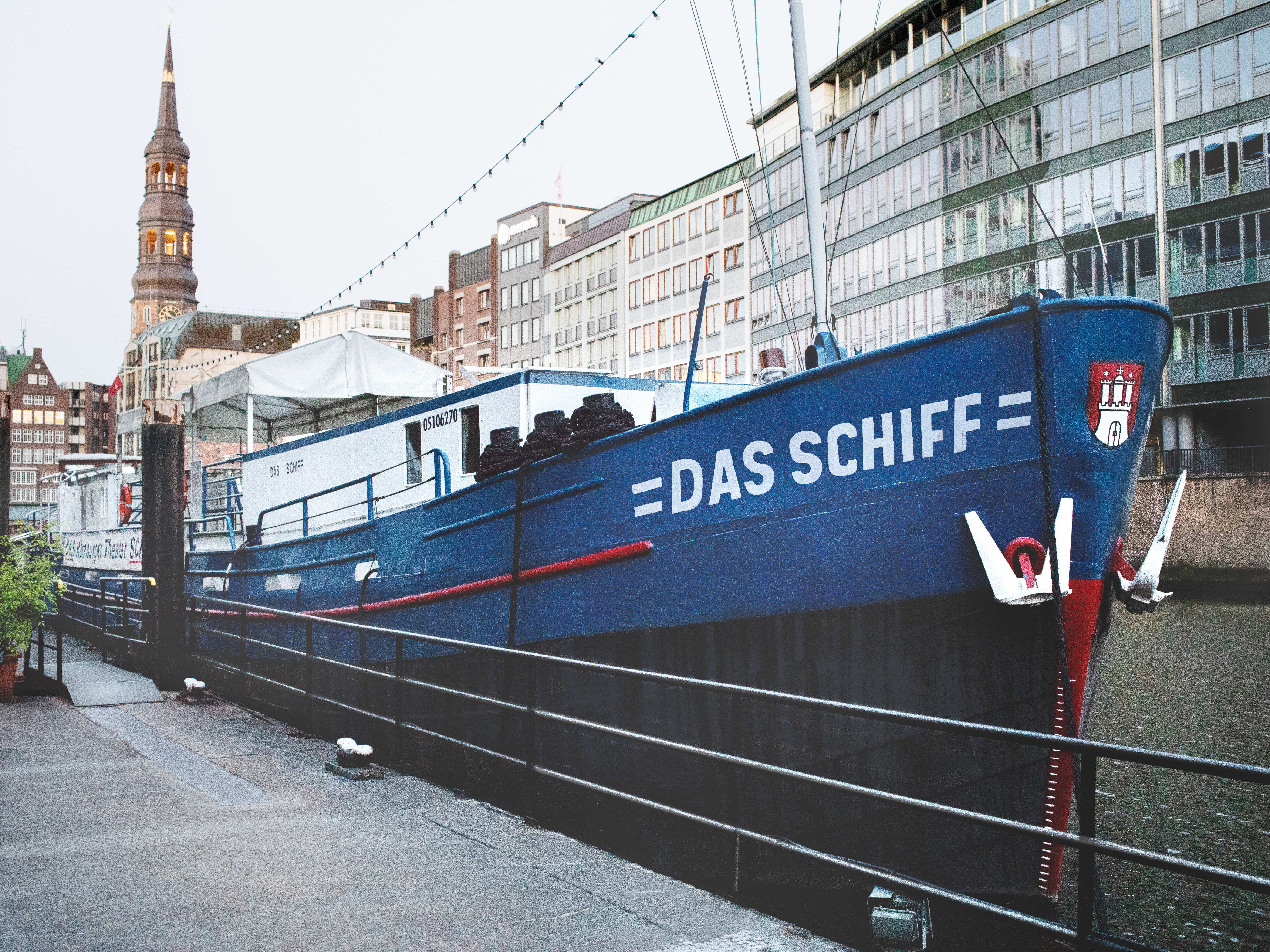 Theaterschiff Hamburg - Liegeplatz Nikolaifleet Bildrechte: Heribert Schindler / Theaterschiff